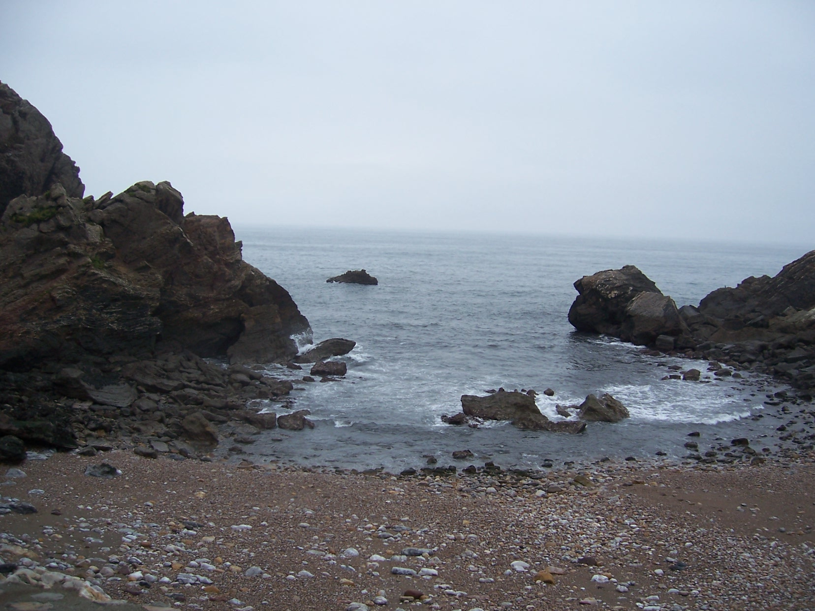 Playa de El Cuerno en Salinas (Asturias, España). Museo de las anclas "Philippe Cousteau". El cuerno beach at Salinas (Asturias, Spain) "Philippe Cousteau" the anchors museum.